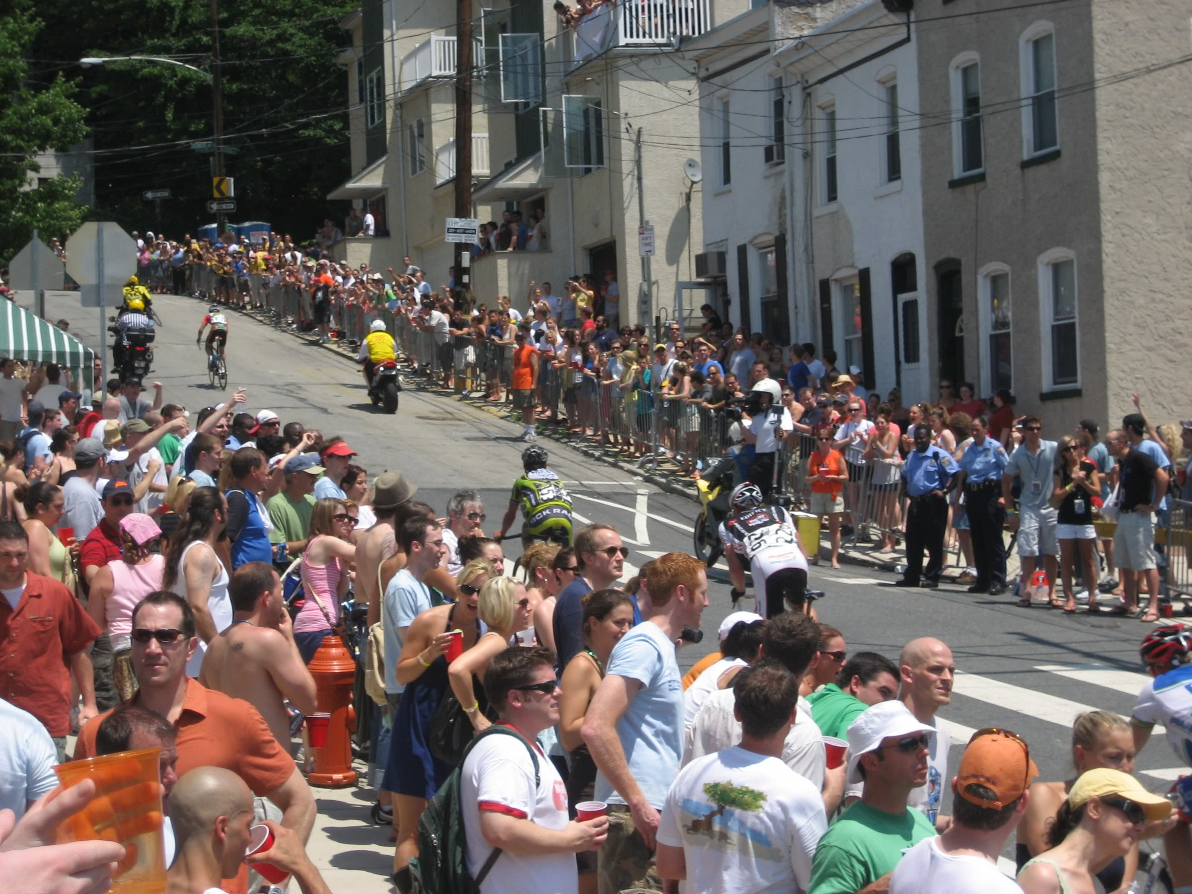 Manayunk Bike Race 2009